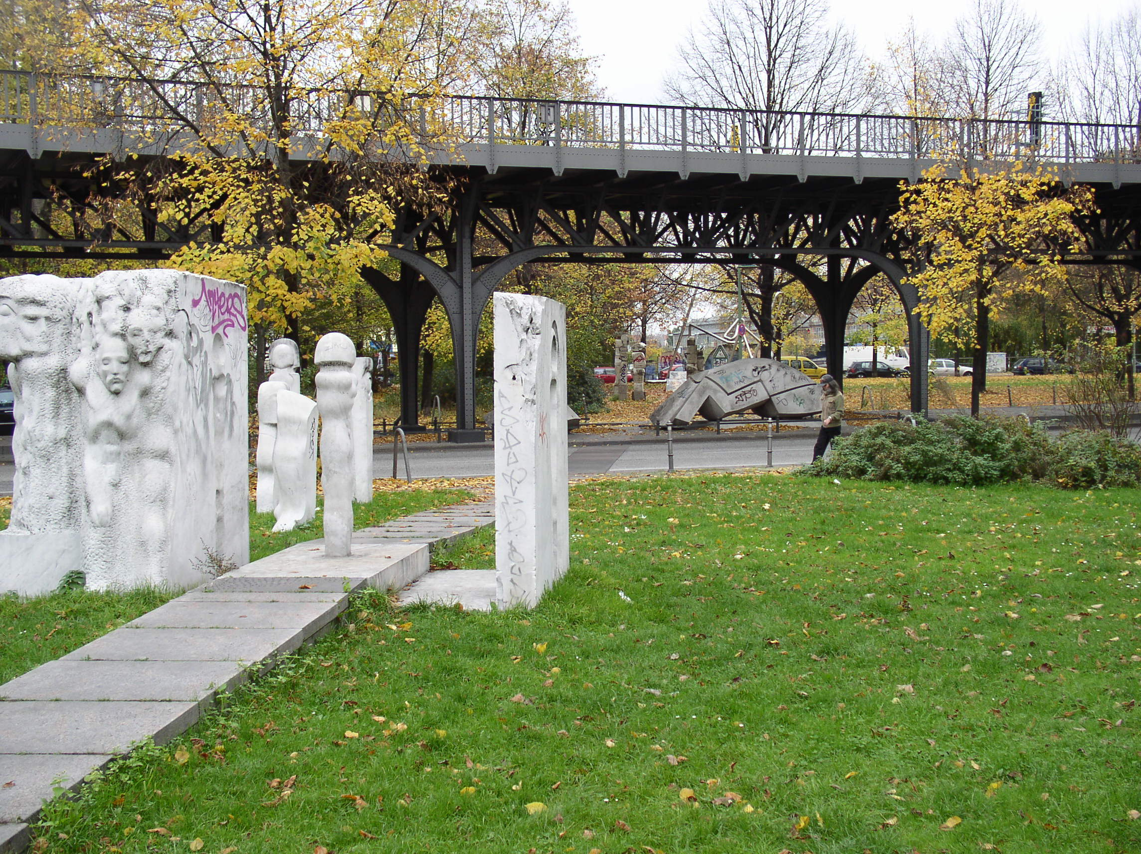 Menschenlandschaft Berlin, fotografiert von Benutzer:Necrophorus; GNU FDL im Vordergrund "Skulpturengruppe" von Mehmet Aksoy, im Hintergrund "Puppenruhe" von Louis Niebuhr